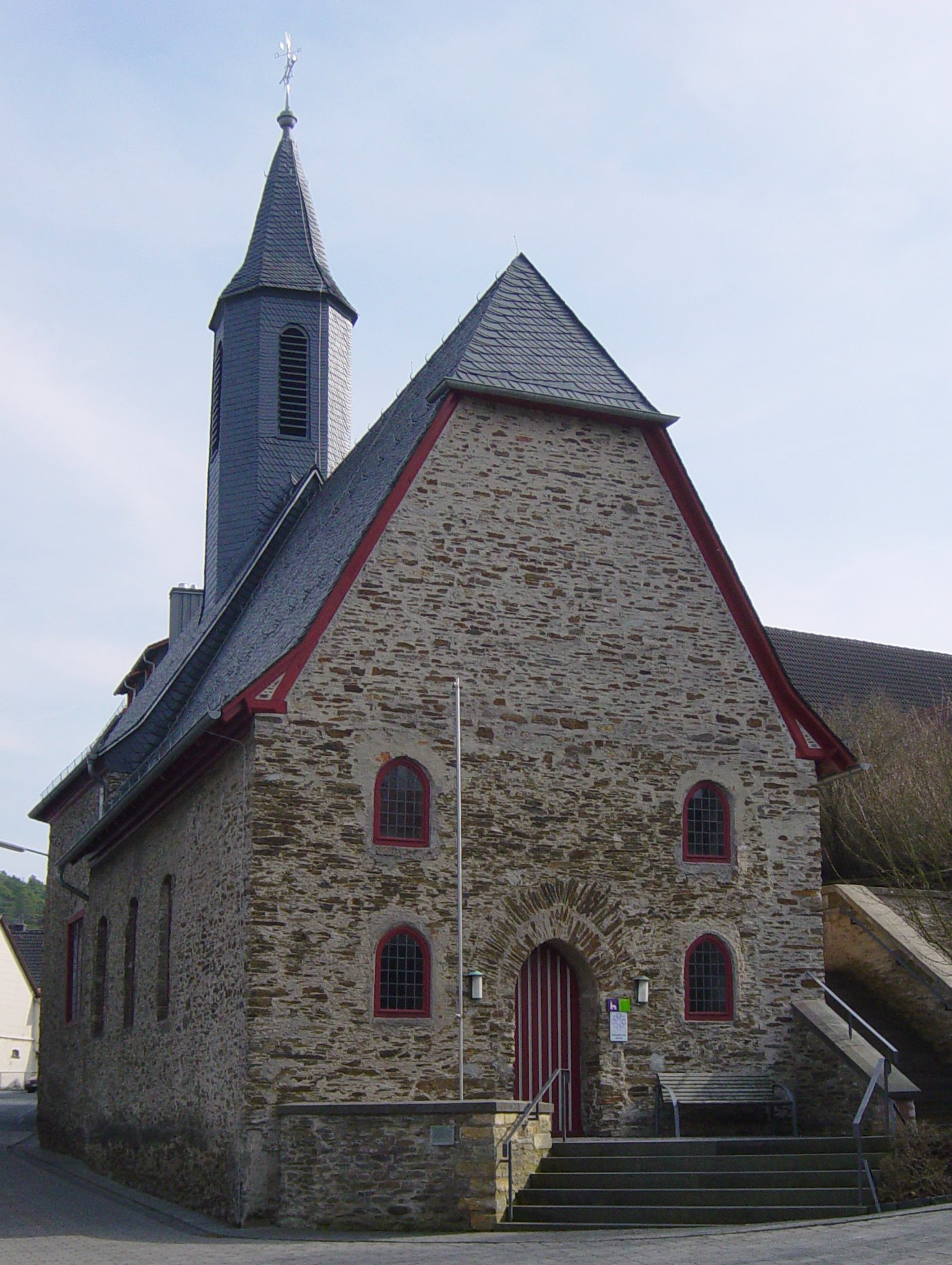 Ev. Kirche in Cleeberg, Südansicht